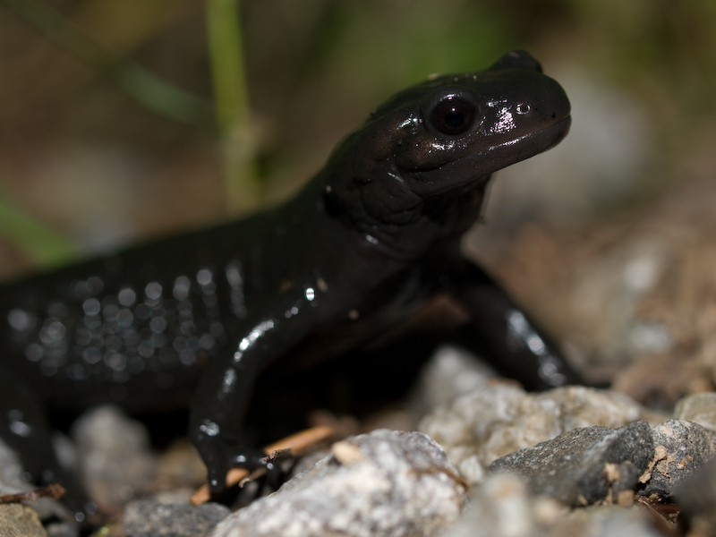 Alpensalamander Standort: bei Adelboden (Schweiz) am Wegrand, im Wald, unweit eines Bergbaches, 1450m über Meer Zeit: 16. Juli 2008, nach 21h